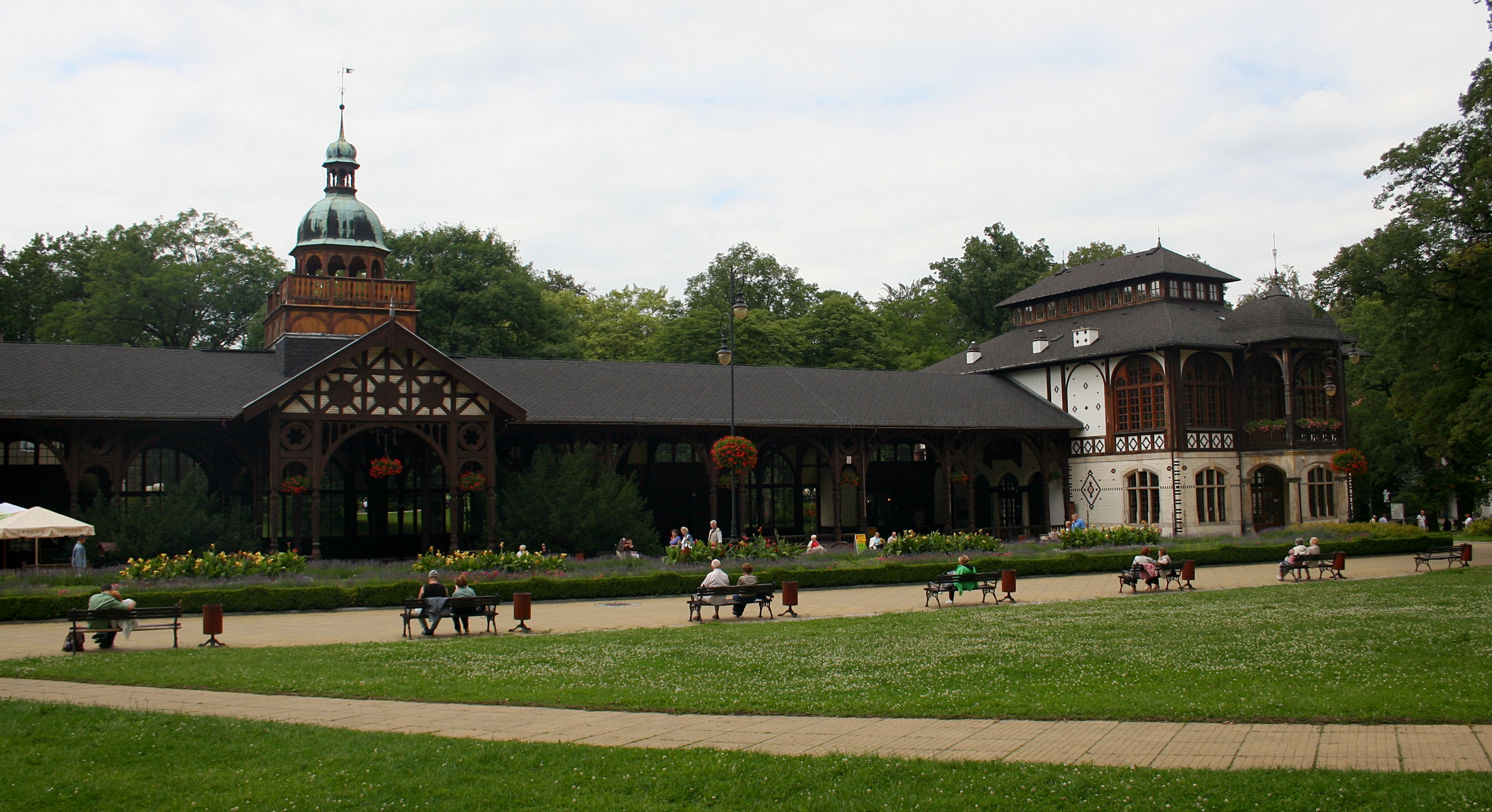 Hala spacerowa i pijalnia wód mineralnych w Szczawnie-Zdroju